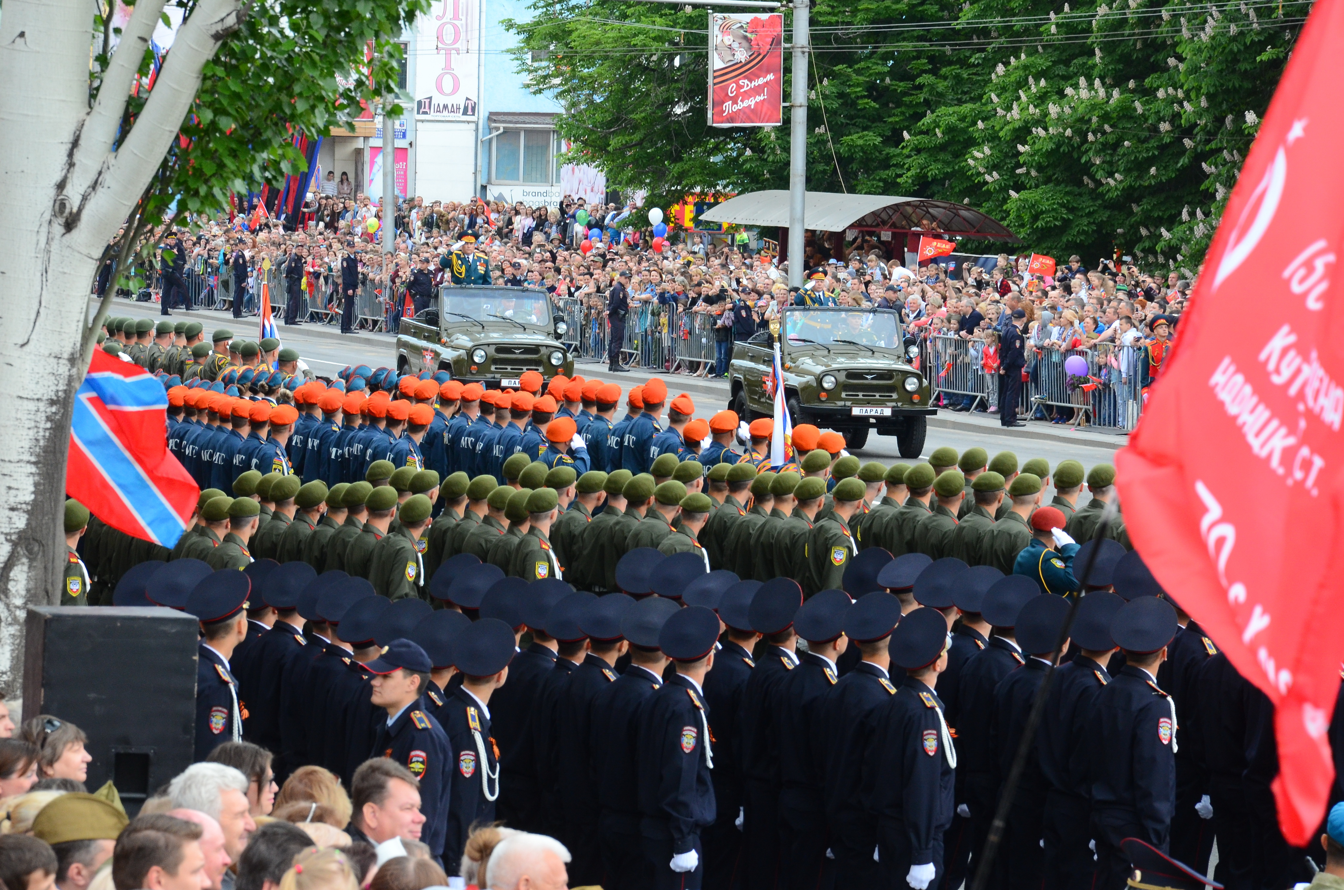 День Победы в Донецке